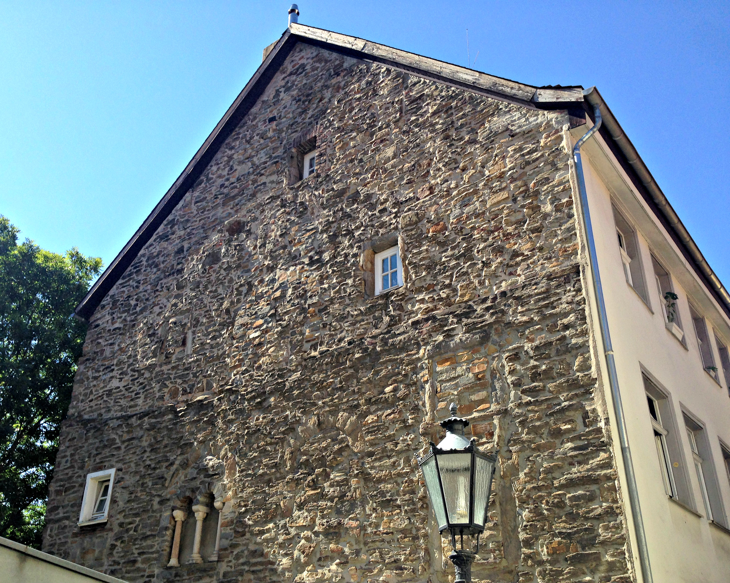 Romanisches Haus in der Hufergasse 7-9 in Essen-Werden aus dem 12. Jh. mit 1992 freigelegtem Rundbogenfenster